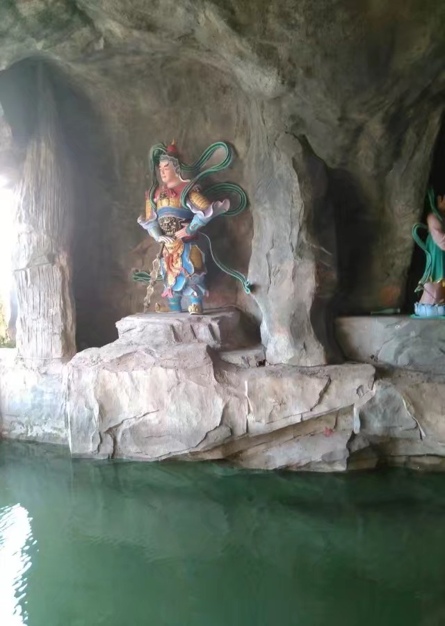 长寿菩提古镇景点之一